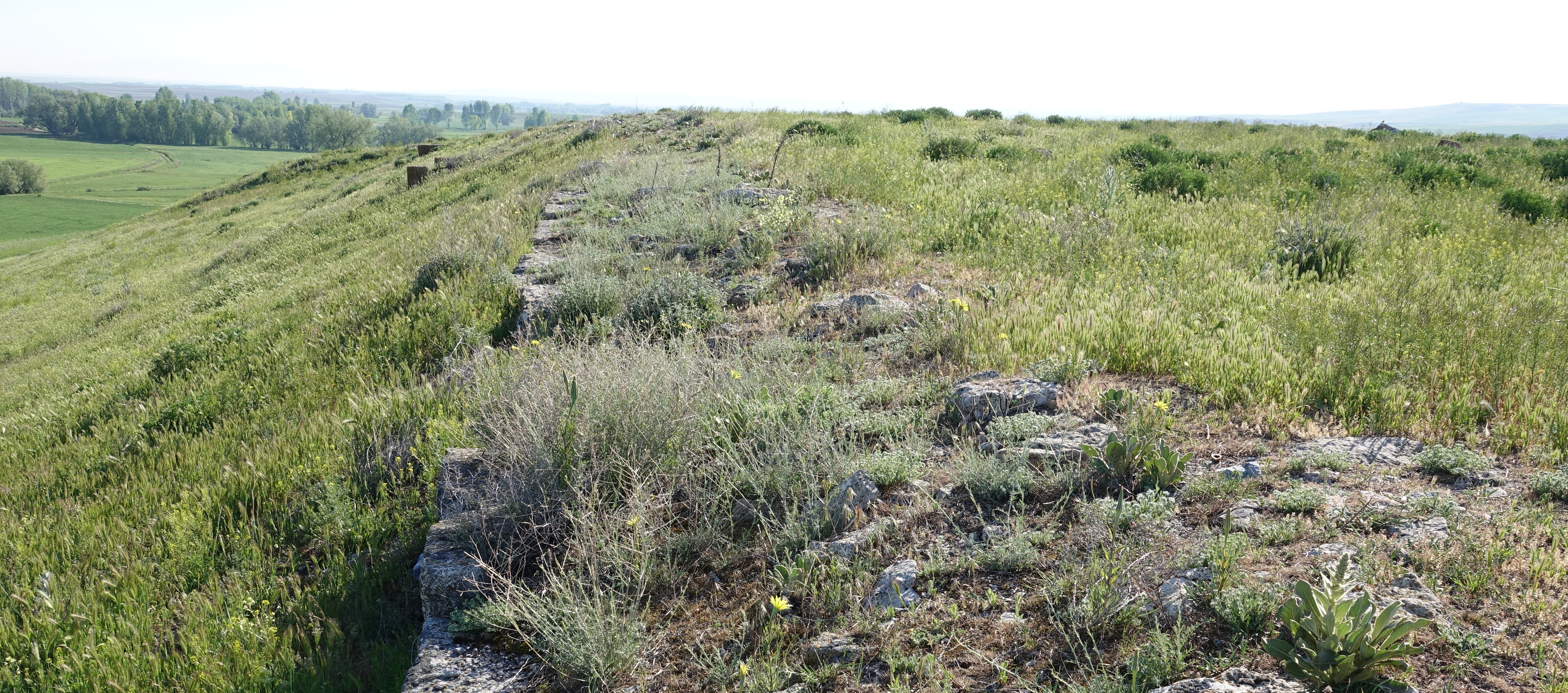 Blick auf die Überreste der unausgegrabenen byzantinischen Stadtmauer